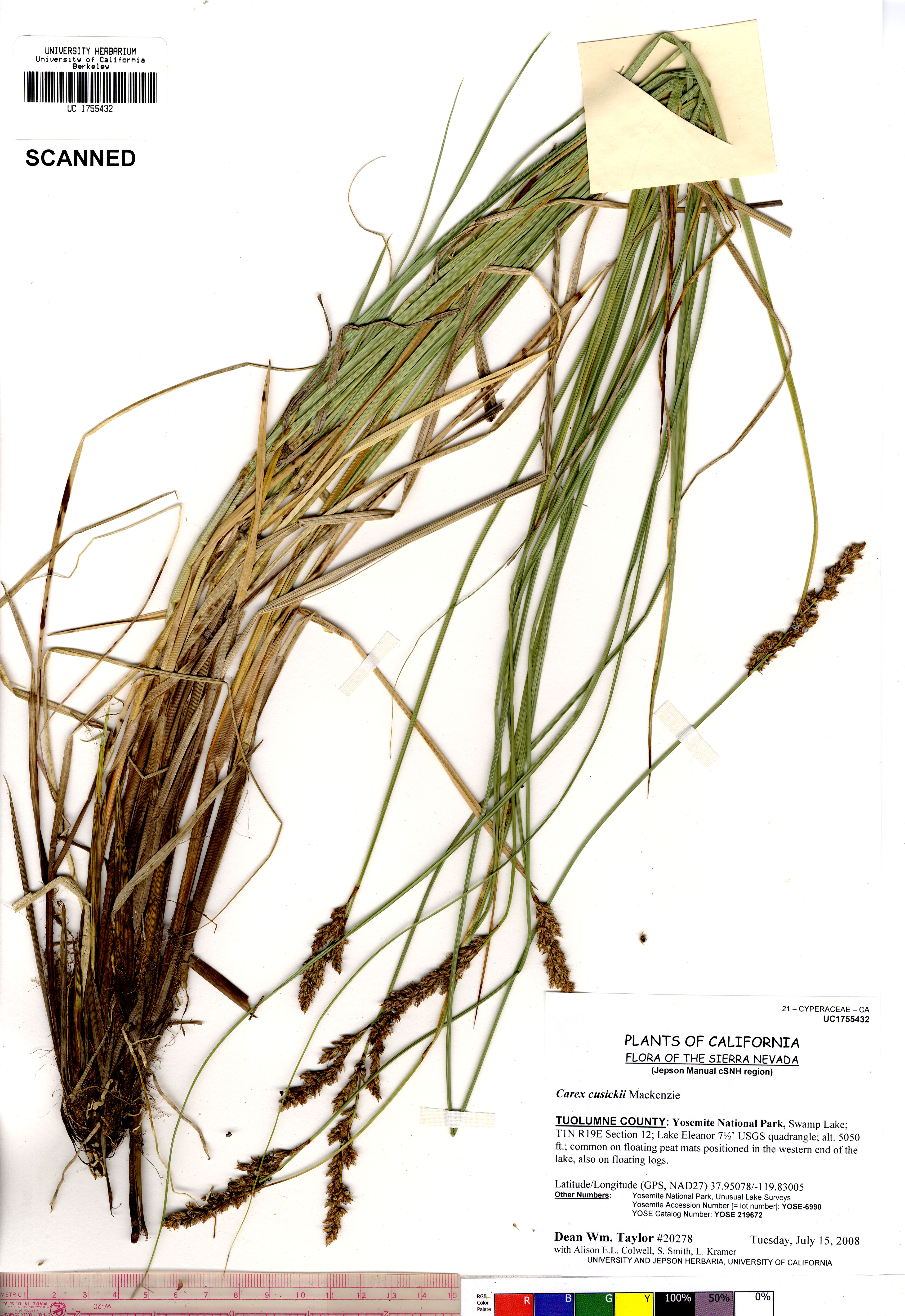 Carex cusickii UC1755432